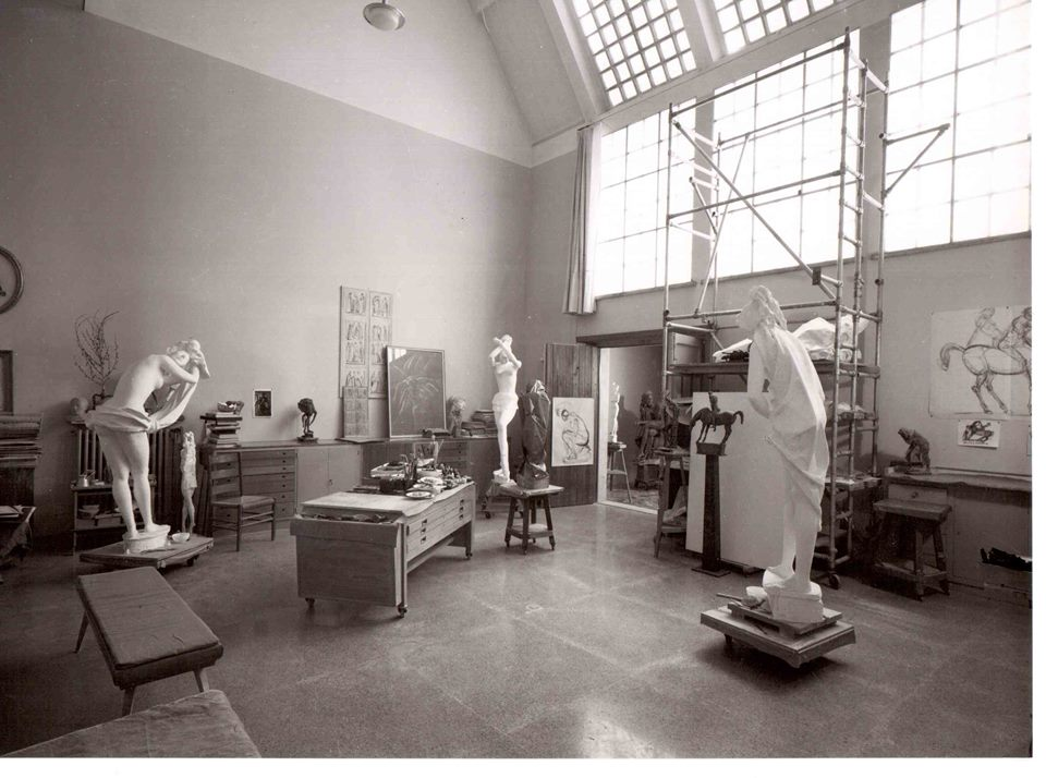 Studio dello scultore situato in Via Cassia, 492